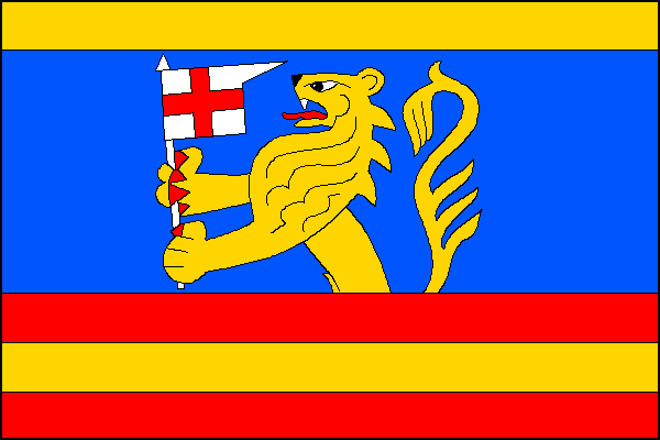 vlajka, Libina, okres Šumperk